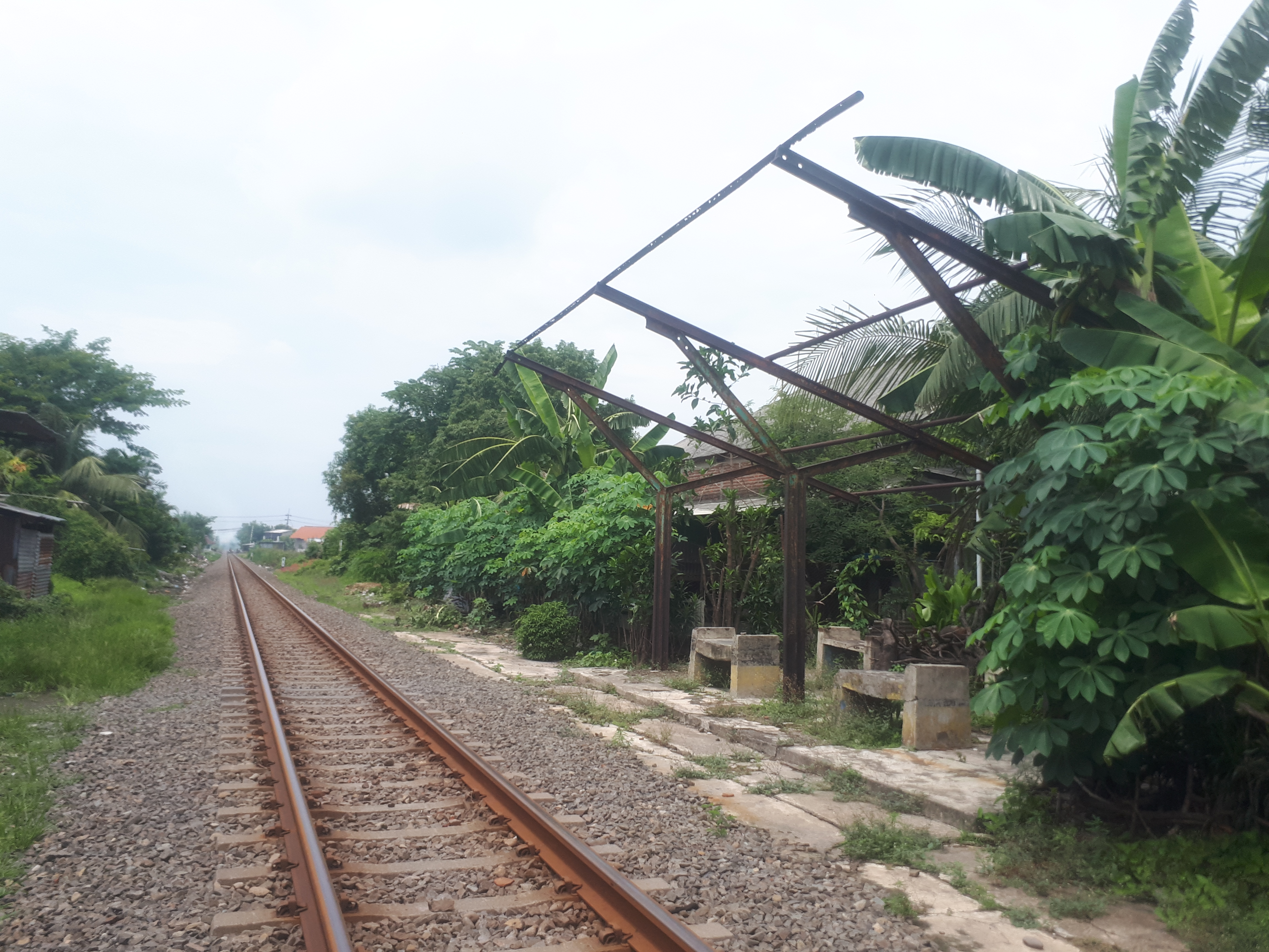 Tampak luar bekas Halte Kumendung tahun 2020